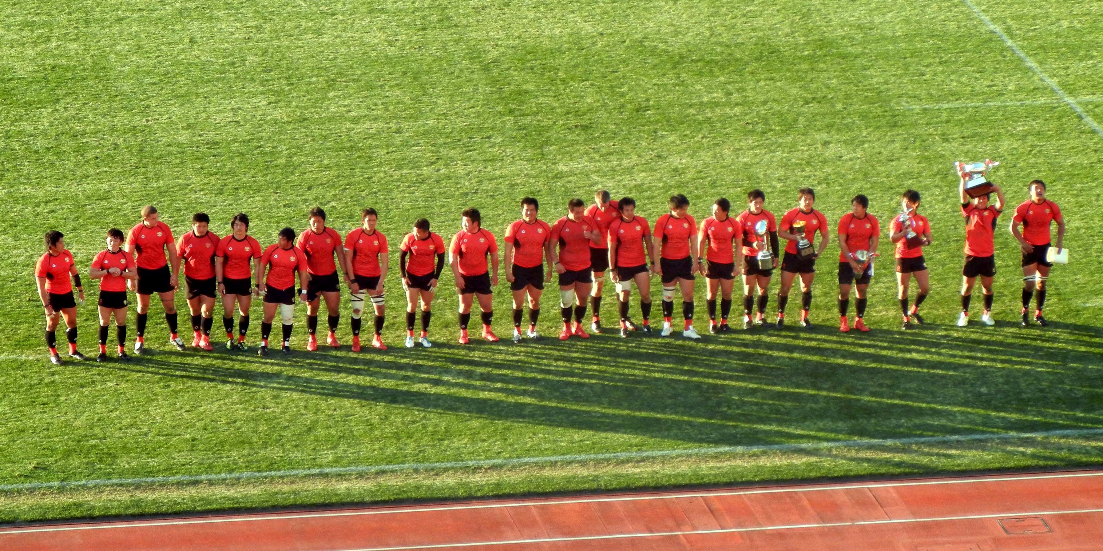 帝京大学ラグビー部 3連覇達成